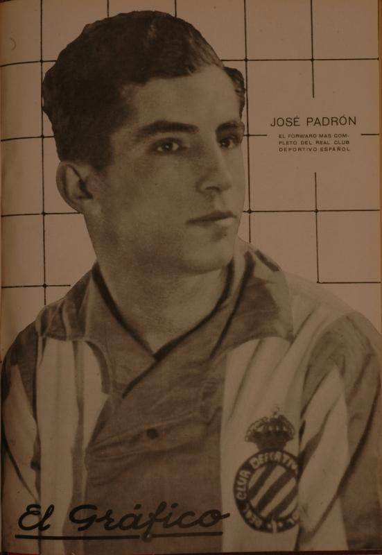 Coberta de la revista El Gráfico: José Padrón-1926